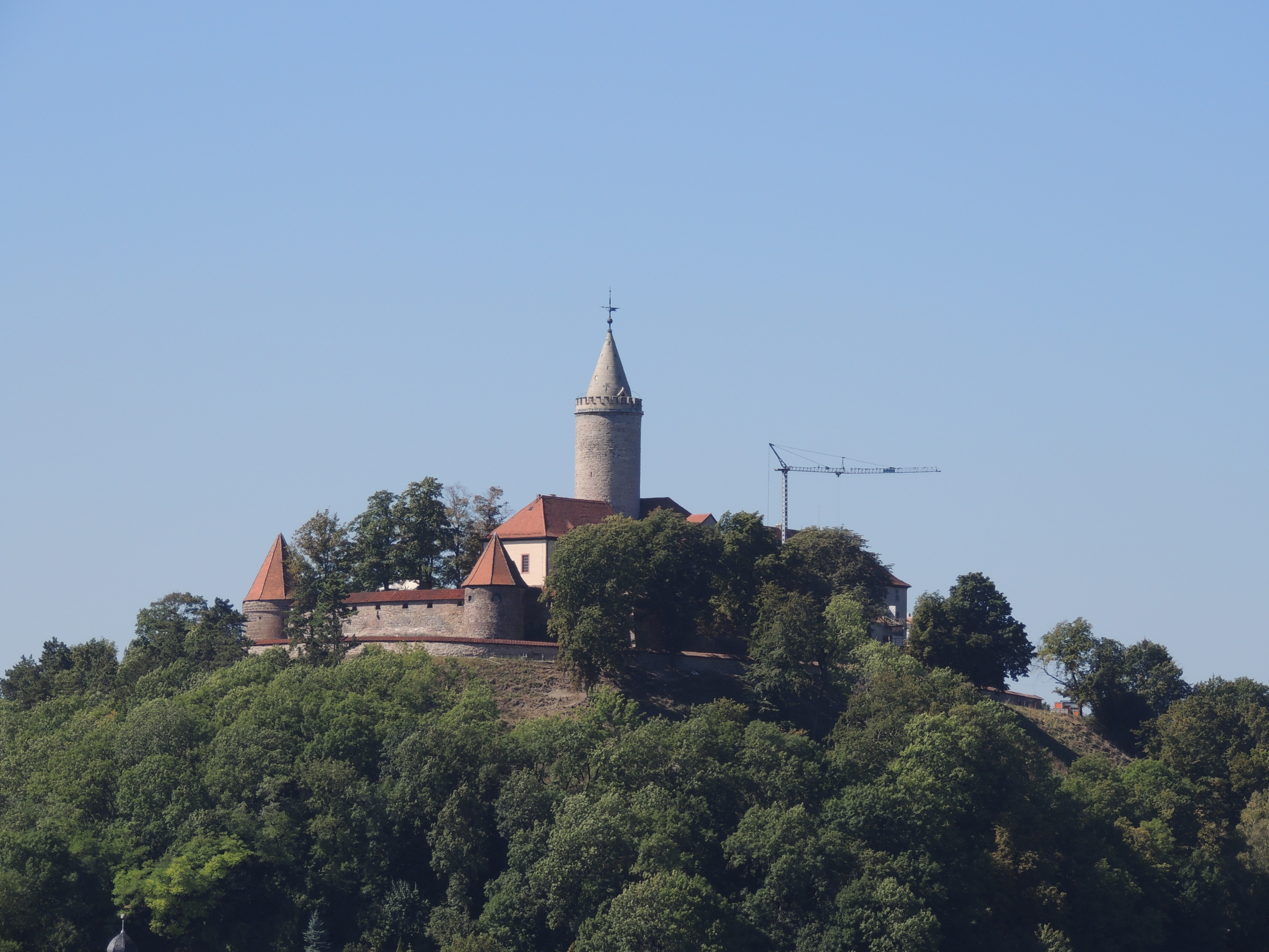 Leuchtenburg über Seitenroda